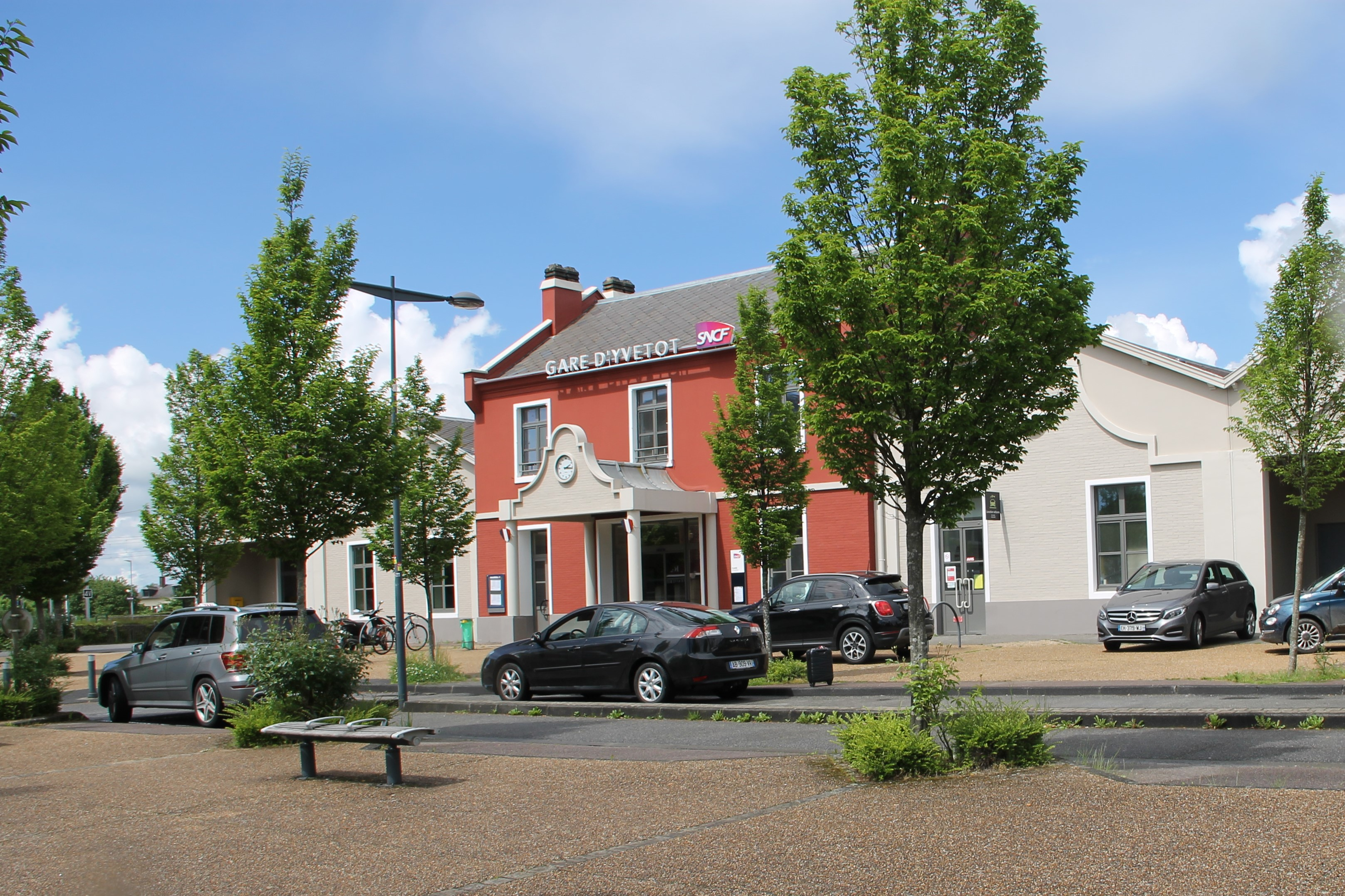 Le bâtiment voyageurs et l'entrée de la gare d'Yvetot, Seine-Maritime, France.